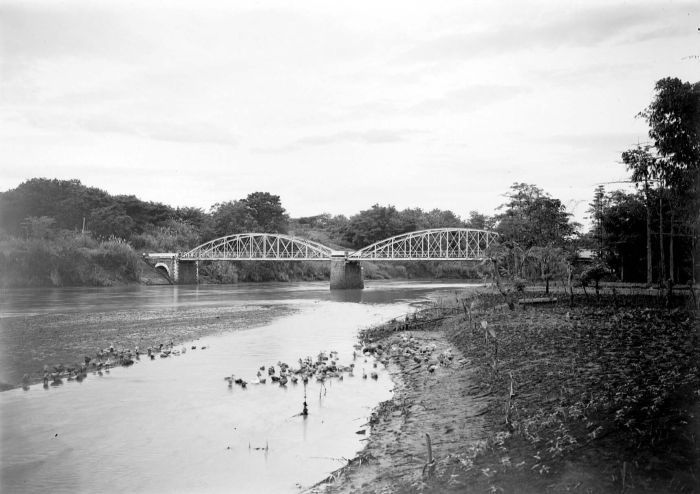 Negatif. Jembatan Ci Manuk di Kadipaten, perbatasan antara residen Priangan dan Cirebon.